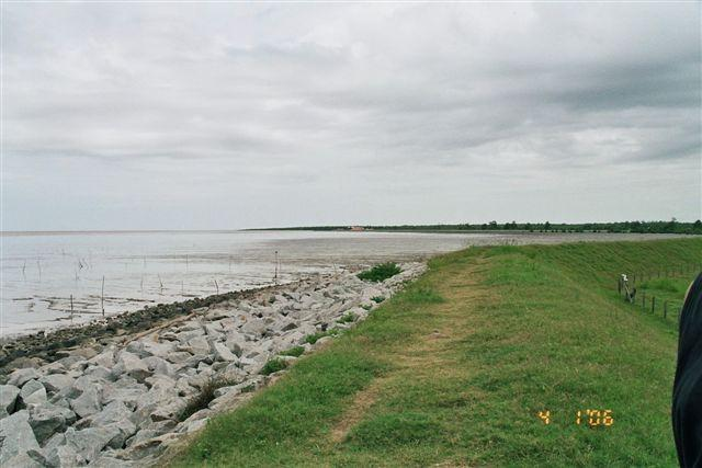 prive foto